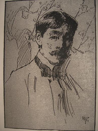 マックレーが描いた源次郎の肖像画（グリニッチ歴史協会所蔵）（年代不詳）